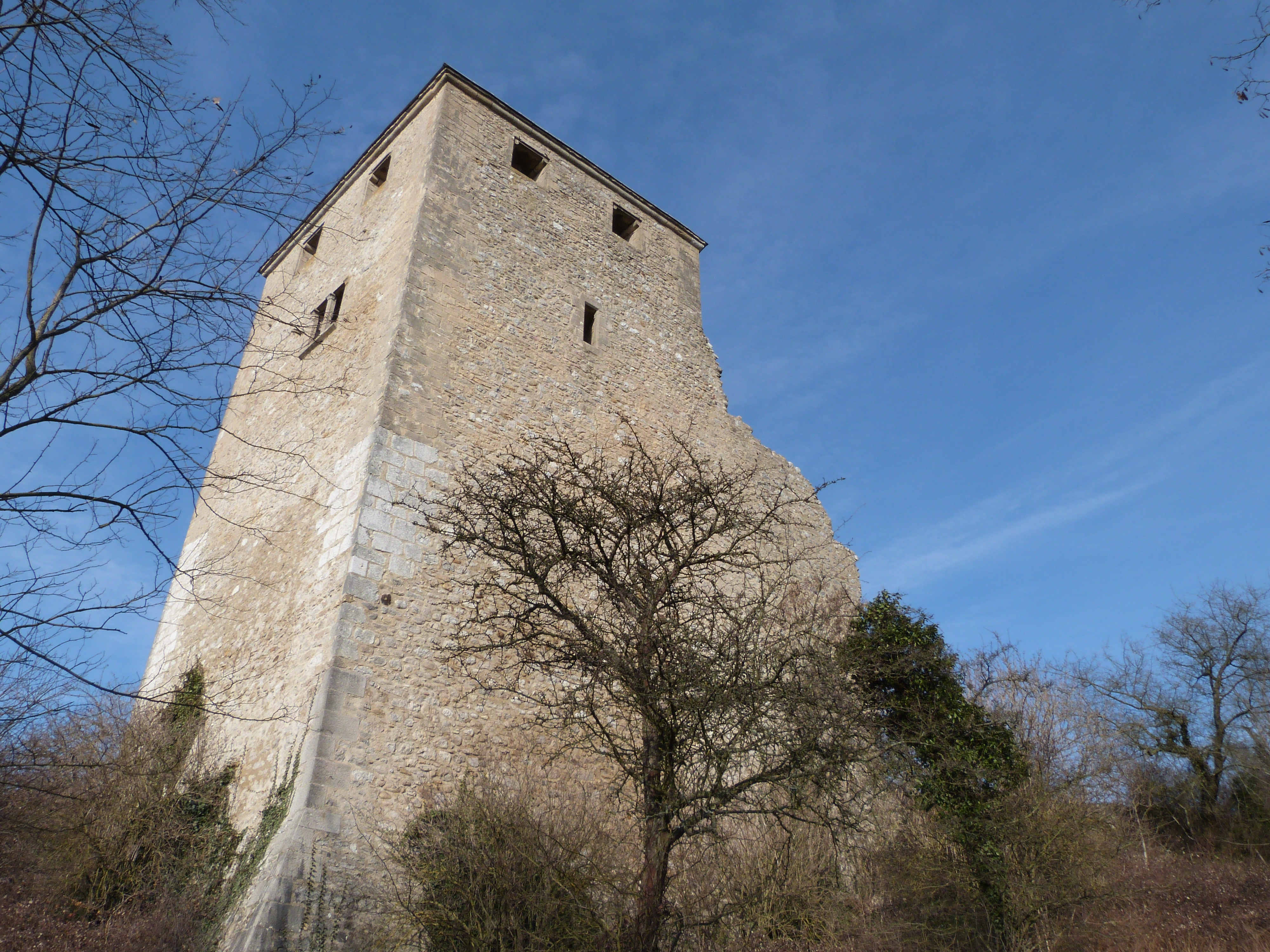 Château de Saint-Denis-en-Bugey1